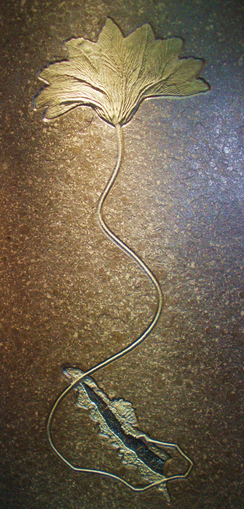 Fossil of Seirocrinus, an extinct echinoderm - Took the photo at Fossil Show, Munich